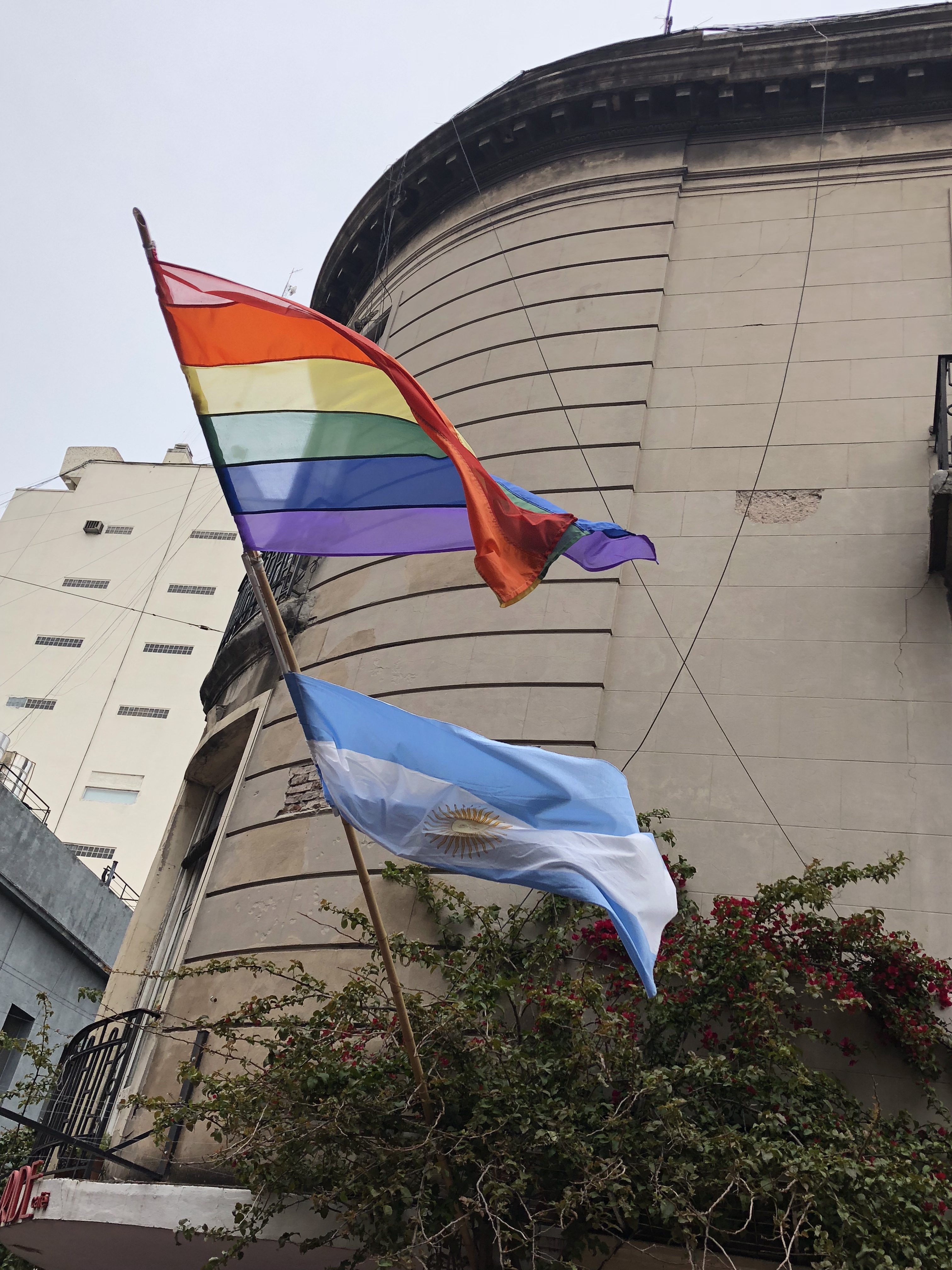 Banderas LGBT y de Argentina en un balcón en Buenos Aires.